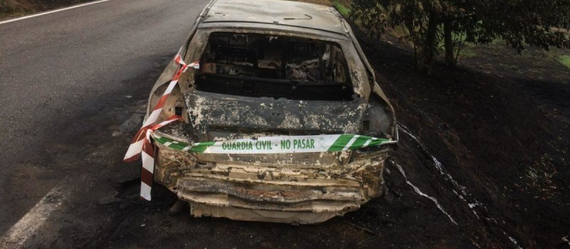 Coche queimado en Chandebrito nos lumes de 2017.